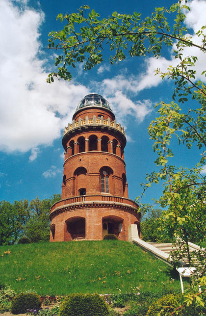 Beschreibung: Bergen (Rügen) - Rugardturm Quelle: selbst fotografiert - Mai 2002 Fotograf: Thomas Freibier Lizenzstatus: GNU FDL